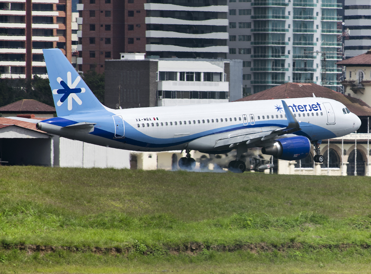 touch down